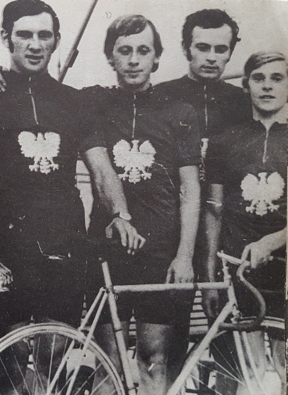 Kolarze z LKS Pomorze